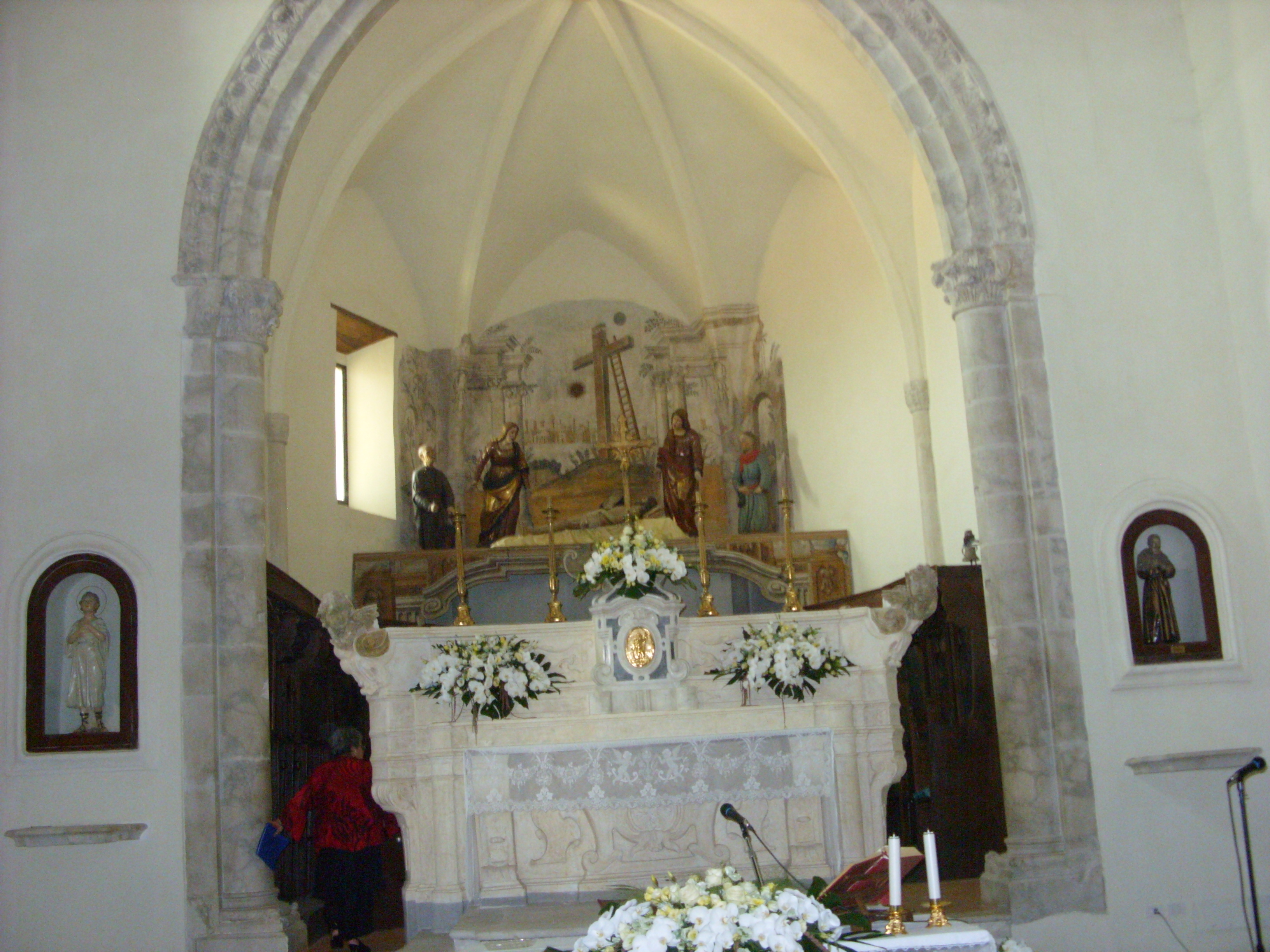 Gruppo scultoreo della Pietà, scolpito da Giovanni da Nola nel 1506-1508, che si trova nella Chiesa della SS. Pietà a Teggiano (SA).